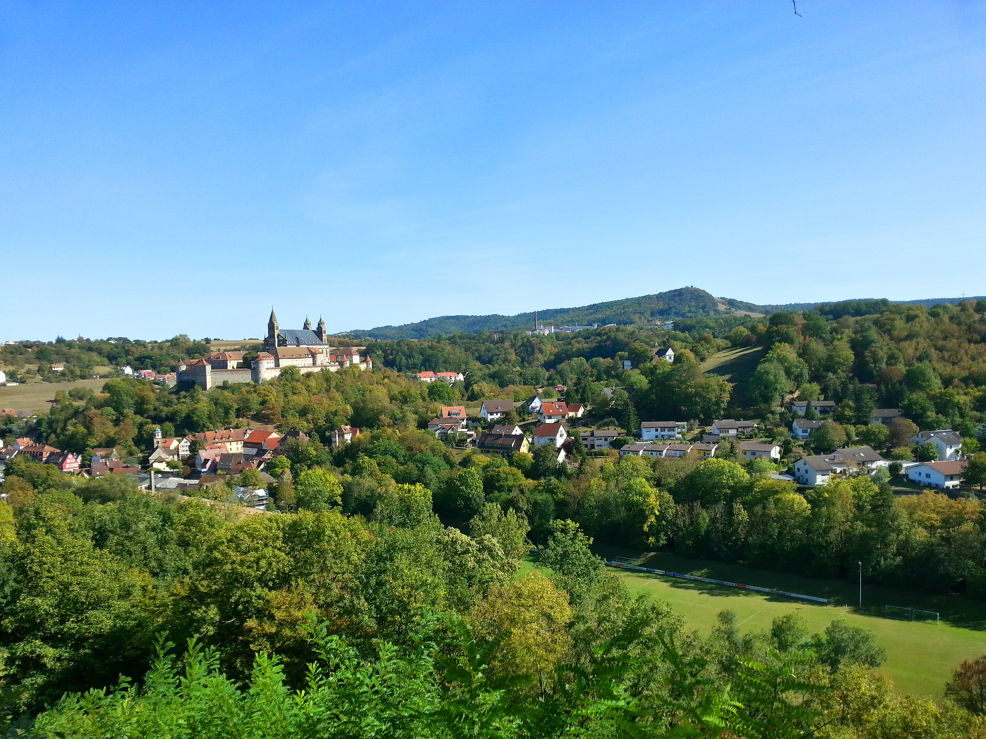 Von links nach rechts: Steinbach am Fuße der Comburg, gegenüber der Comburg die Kleincomburg, im Hintergrund Hessental und der Einkorn. Von der Tullauer Höhe aus gesehen.